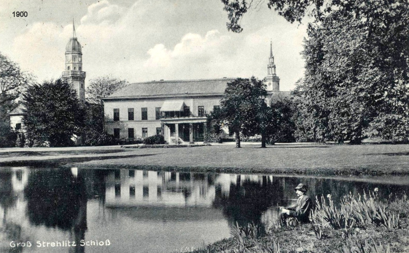 Ce château est en ruines en 2015. Groß Strehlitz, en polonais Strzelce Opolskie, se trouve en Silésie; Ce château appartenait à la famille von Renard, puis à Mortimer von Tschirschky Renard (1844-1908)